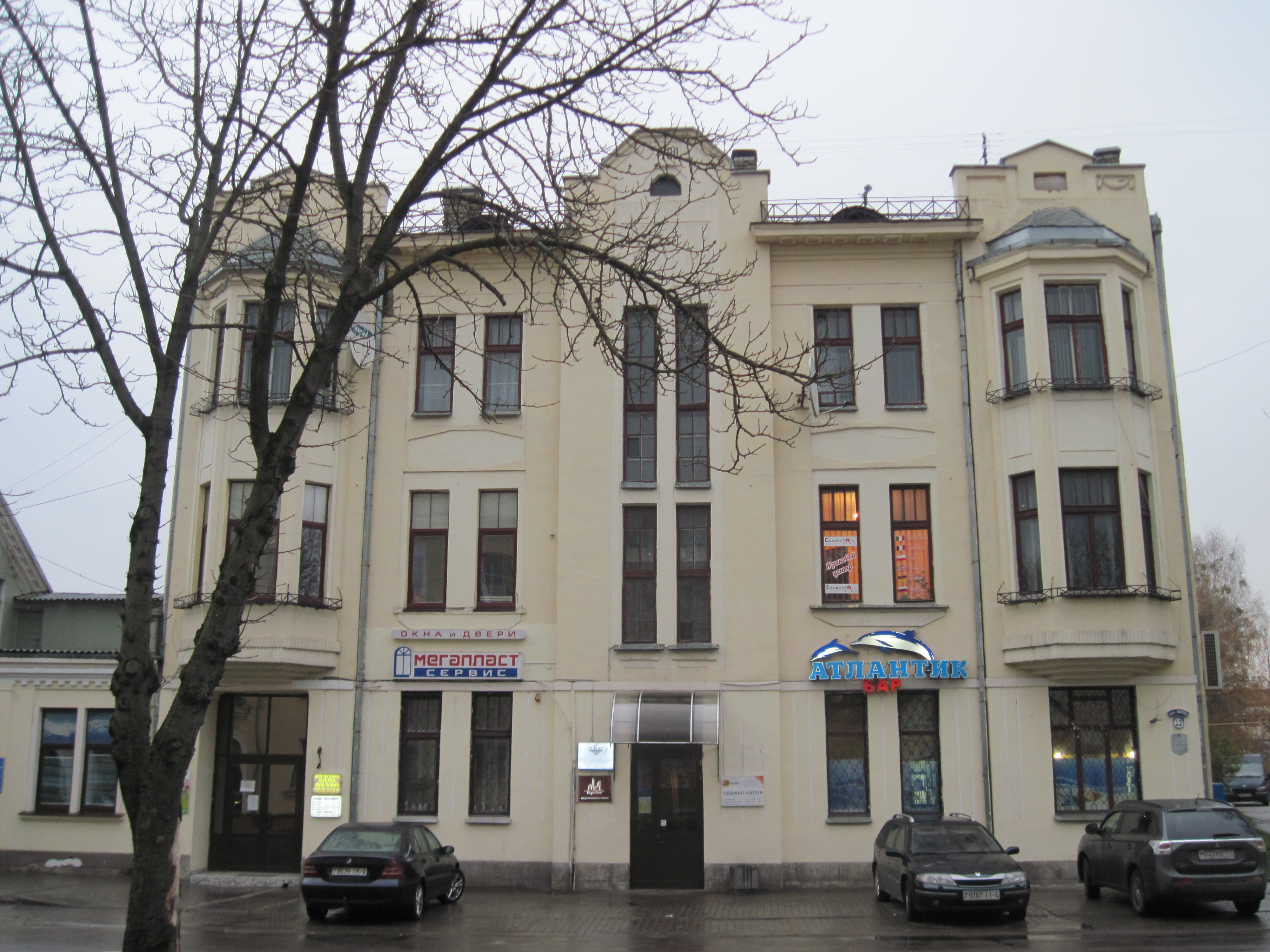 Будынак былога даходнага дома. Гродна, вул. Леніна, 13